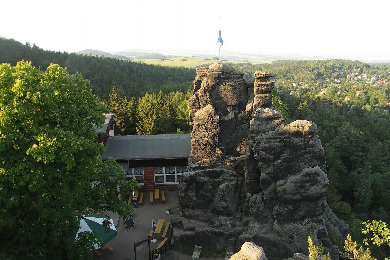 Nonnenfelsen, Zittau Mountains, Saxony, Germany